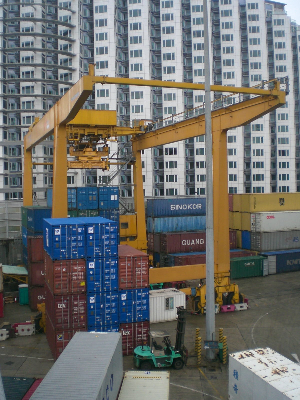 九廣鐵路公司在紅磡站的貨櫃碼頭